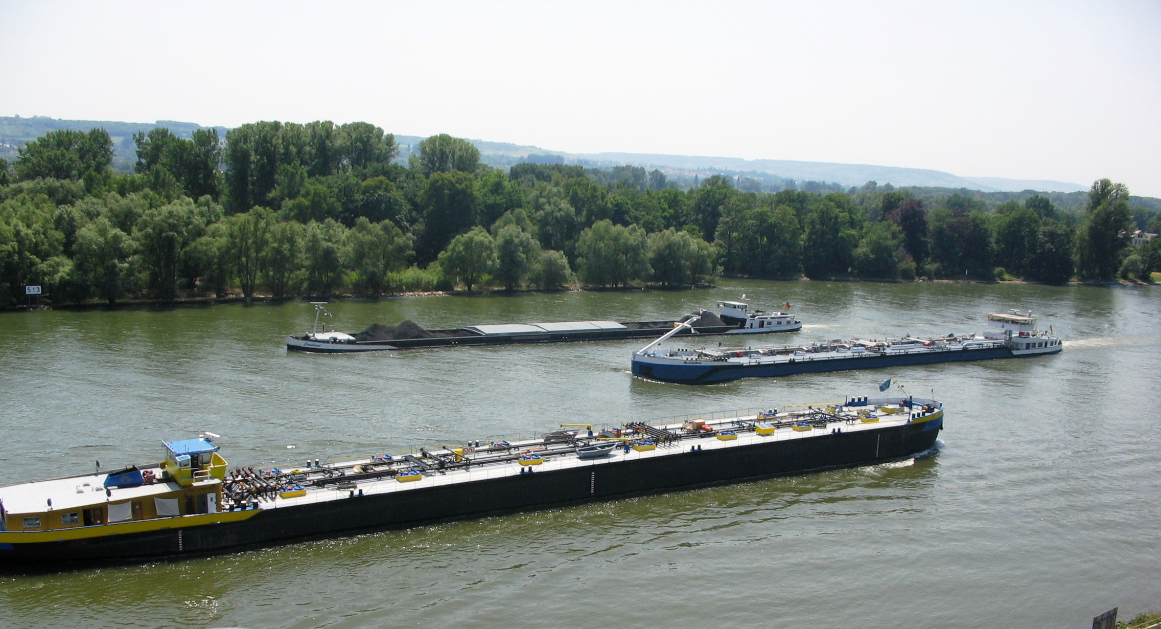 Schiffsverkehr auf dem Rhein bei Stromkilometer 513; ein Tankmotorschiff in Talfahrt, ein Tankmotorschiff und ein Gütermotorschiff im Überholmanöver auf Bergfahrt